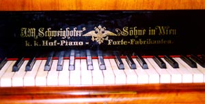 Inschrift "J. M. Schweighofer's Söhne in Wien" k.k. Hof-Pianoforte-Fabrikanten, ab 1869